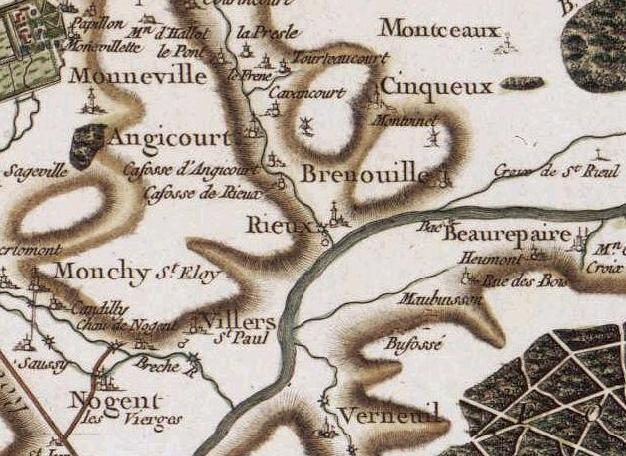 Rieux (Oise), carte de Cassini.